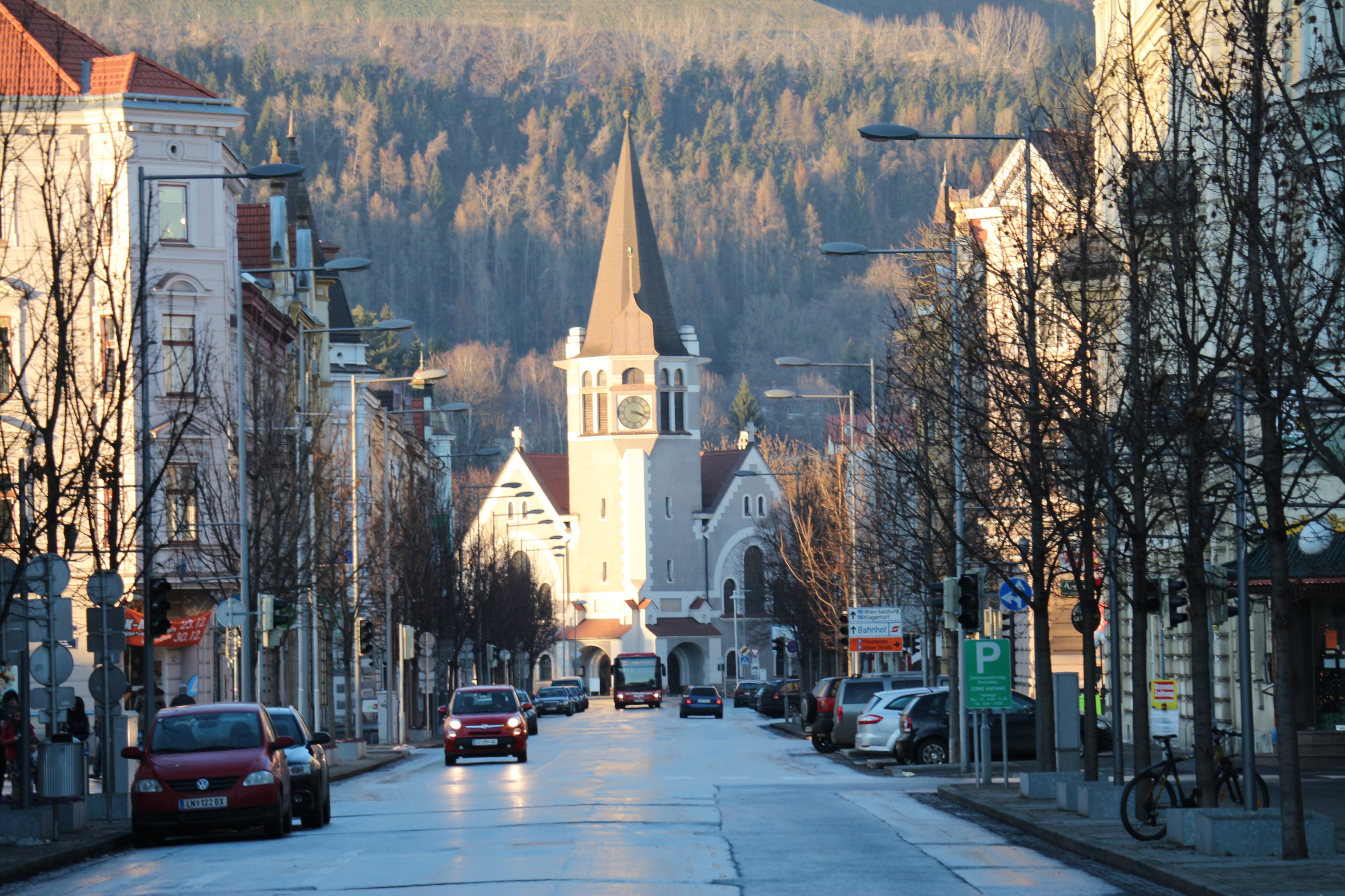 In der steirischen Stadt Leoben